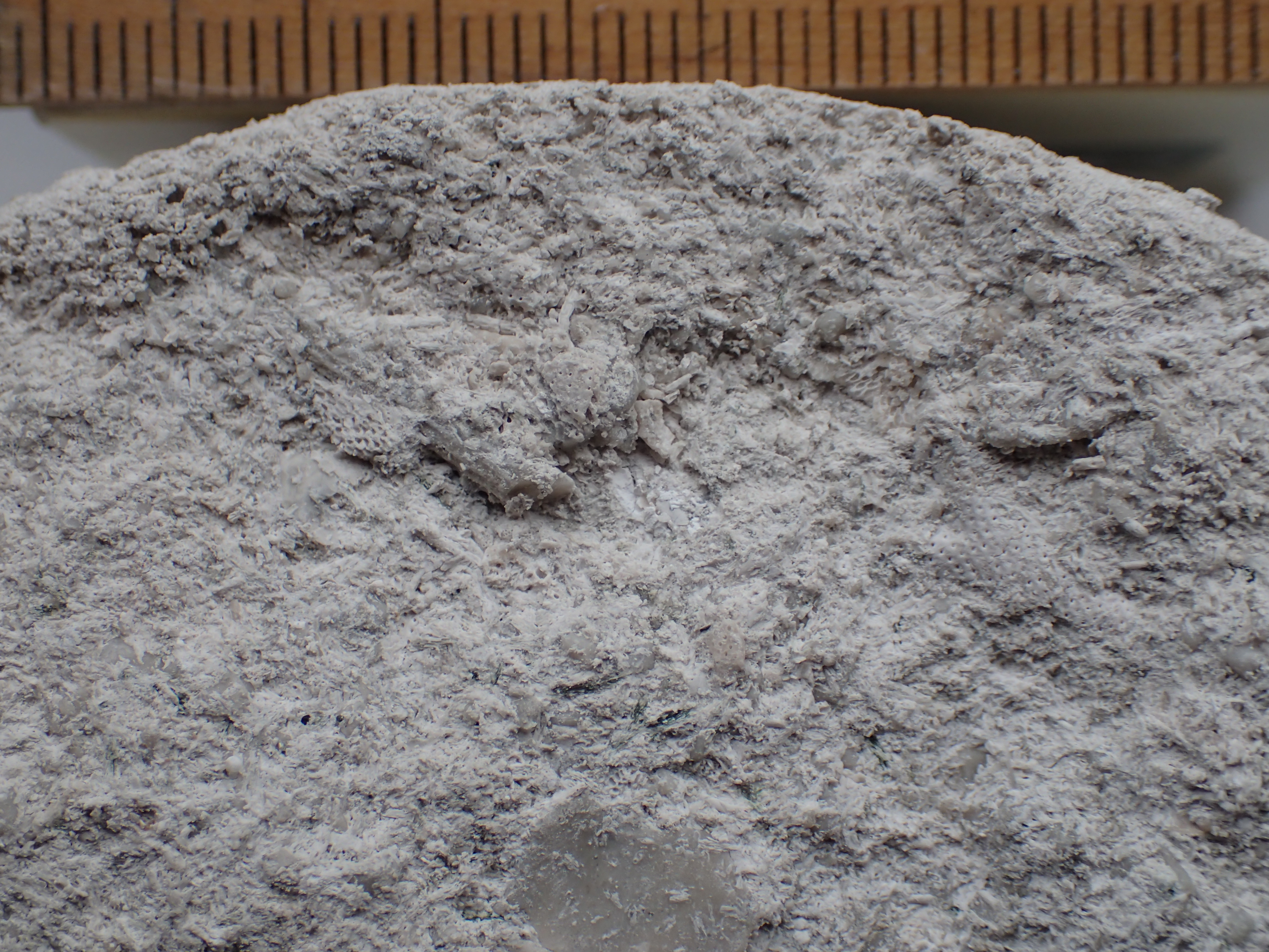 lagflade i fossilrig bryozokalk fra Malmø; skala i mm